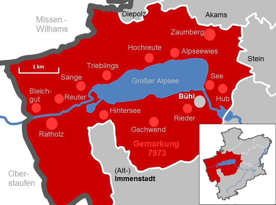 Immenstadt Gemarkung 7973 Bühl (erstellt mit MS-Excel)